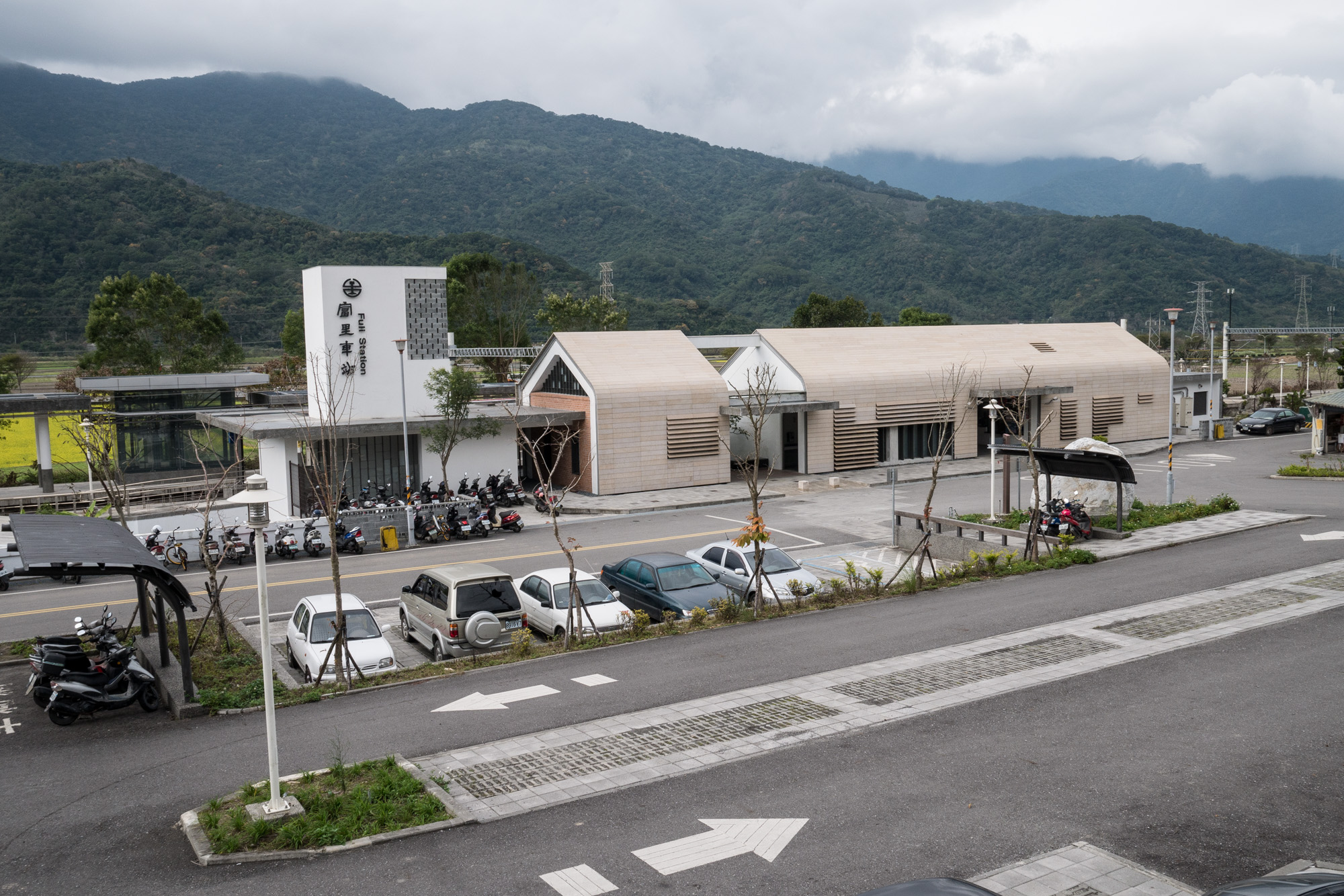 富里車站